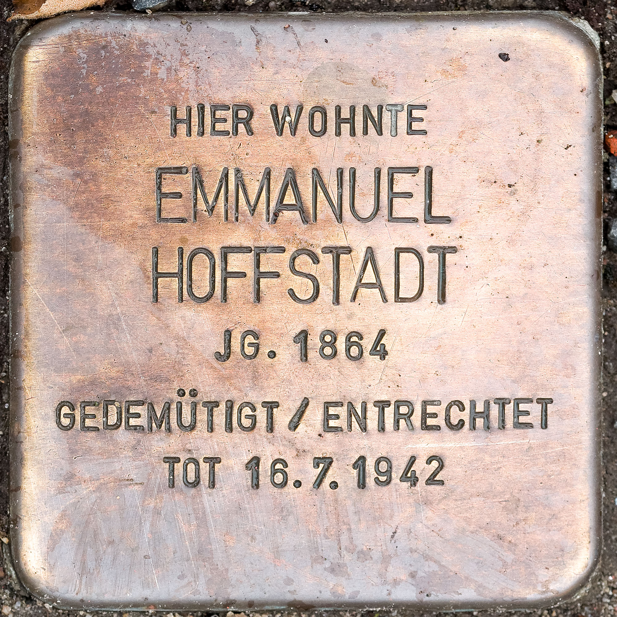 Stolpersteine Straelen: Hoffstadt, Emanuel